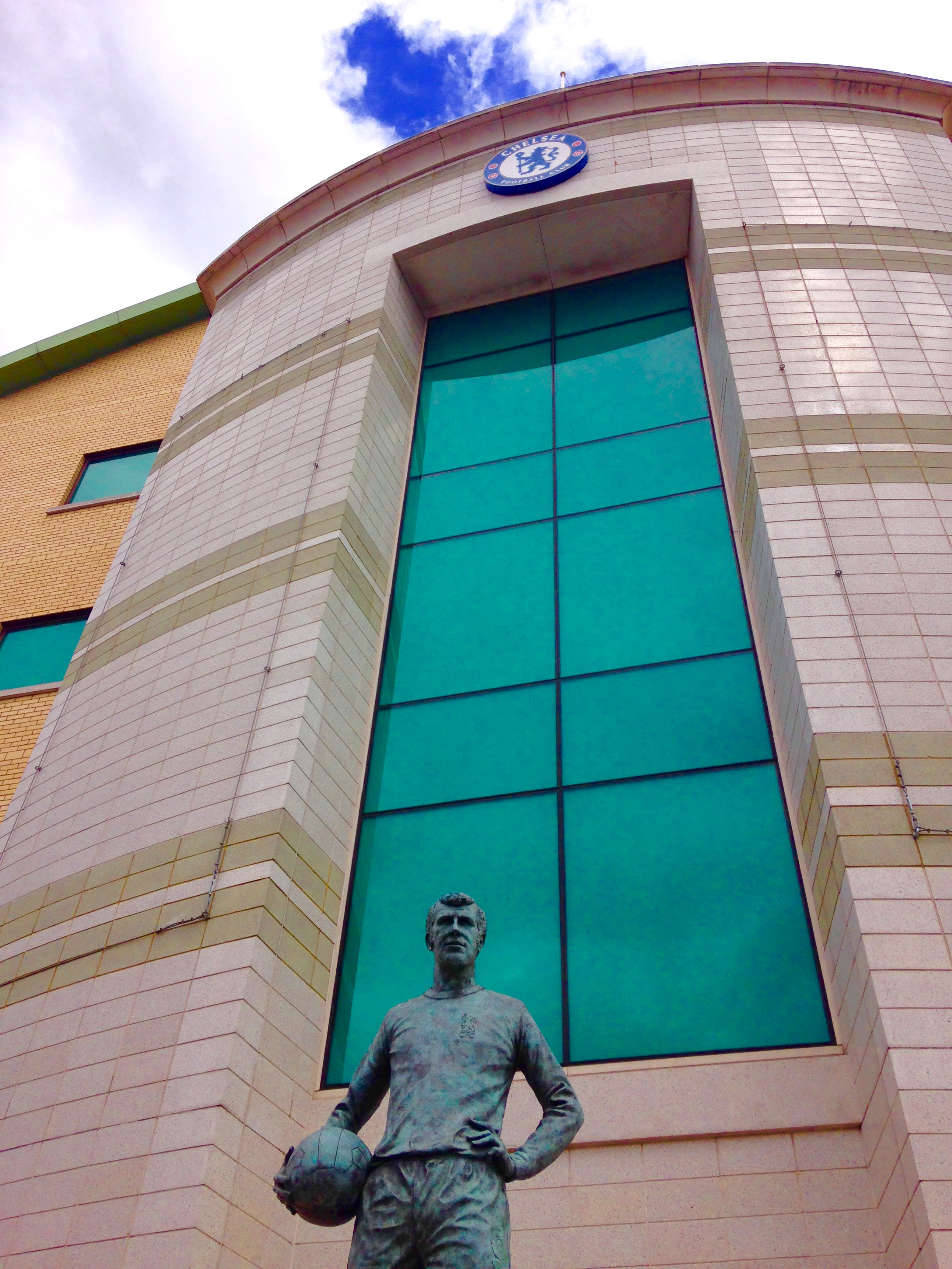 Stamforde Bridge